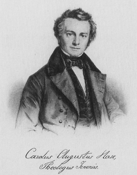 Karl von Hase